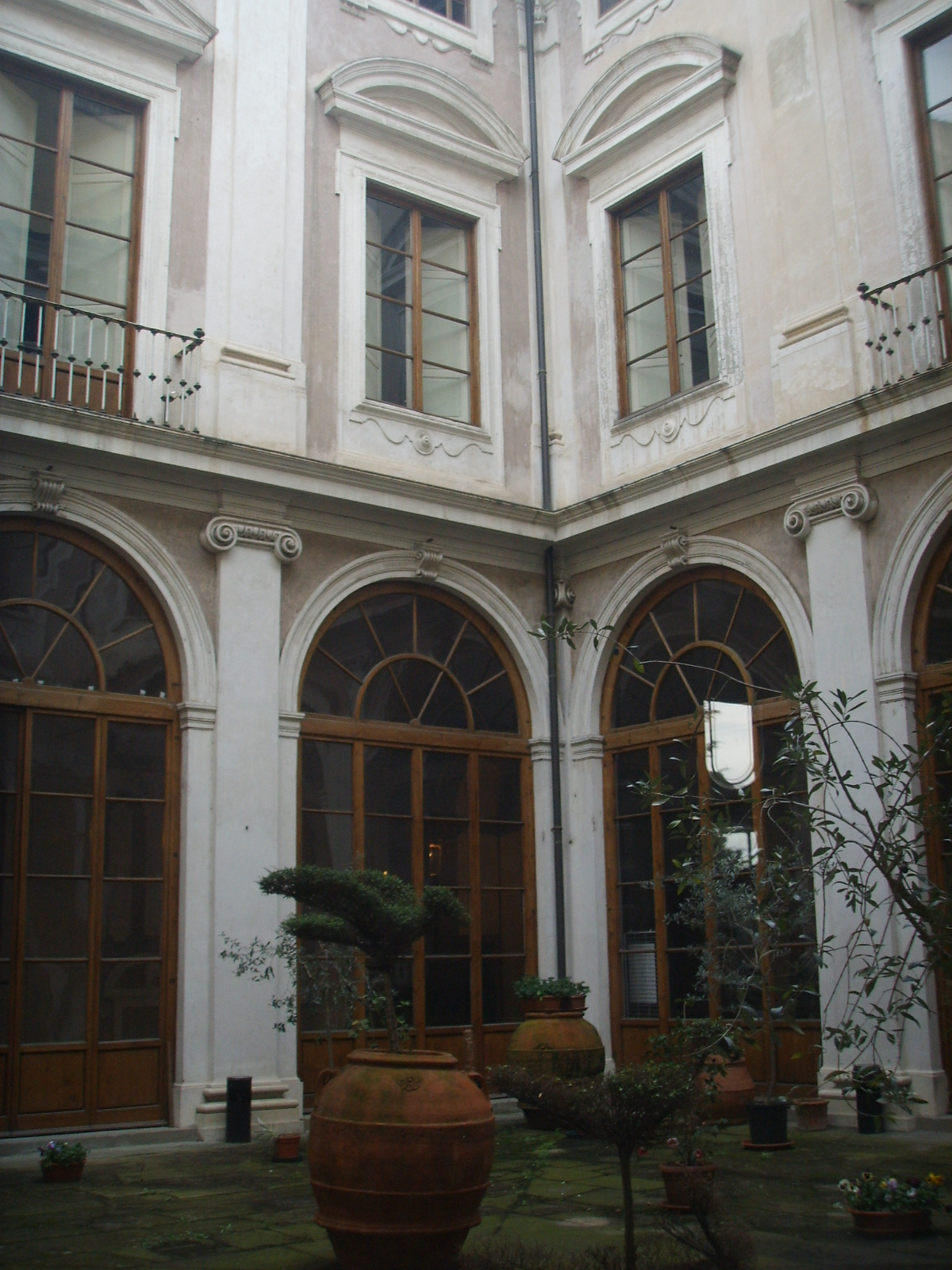 Villa_di_Poggio_Imperiale, primo_cortile_interno